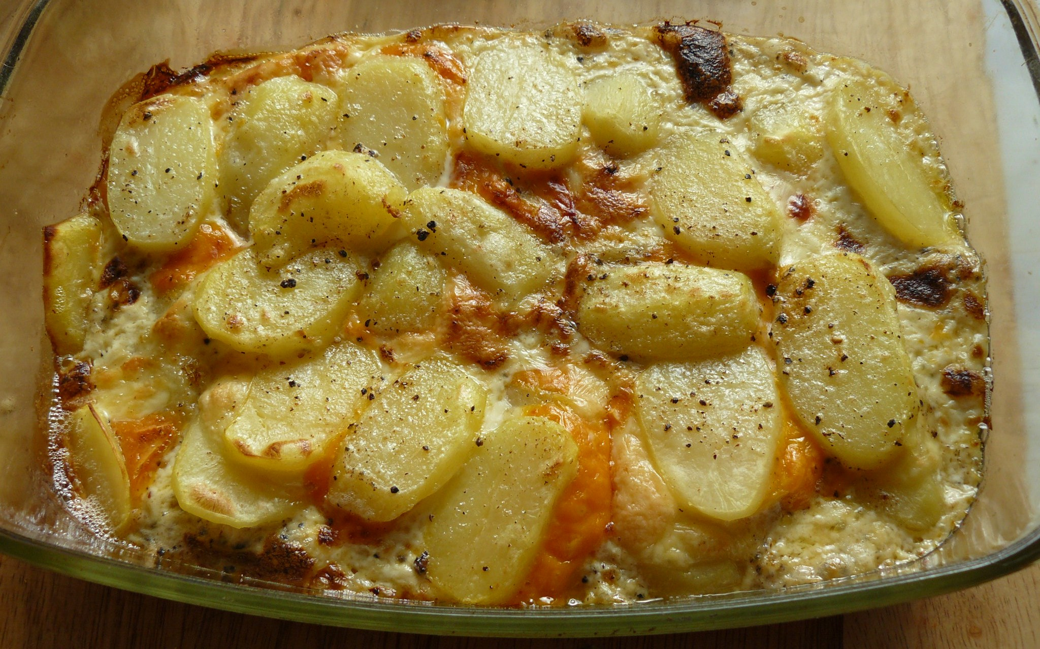 Zapiekanka serowo-ziemniaczana.